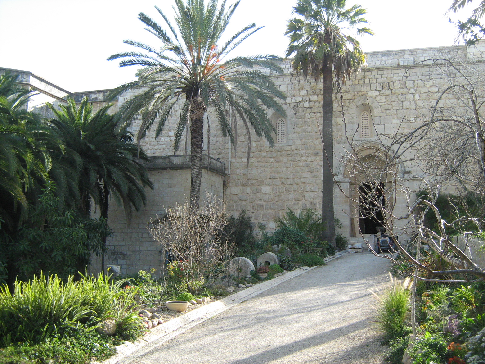 הכניסה לכנסייה במנזר הבנדיקטיני באבו גוש